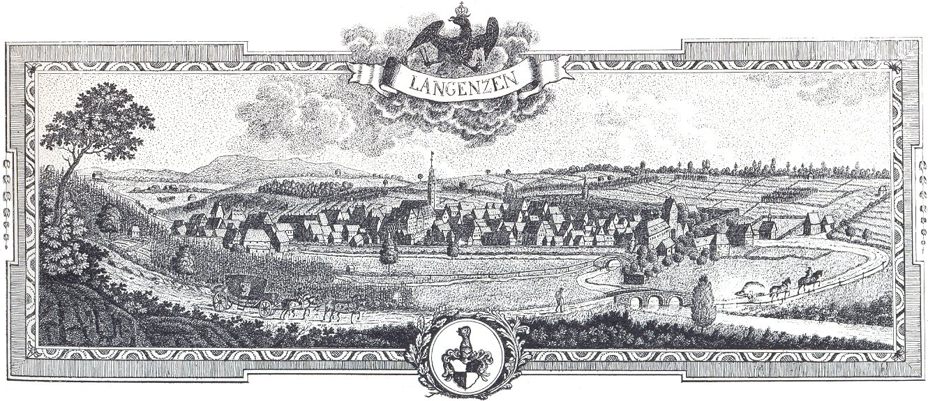 Stich für Gesellenbrief